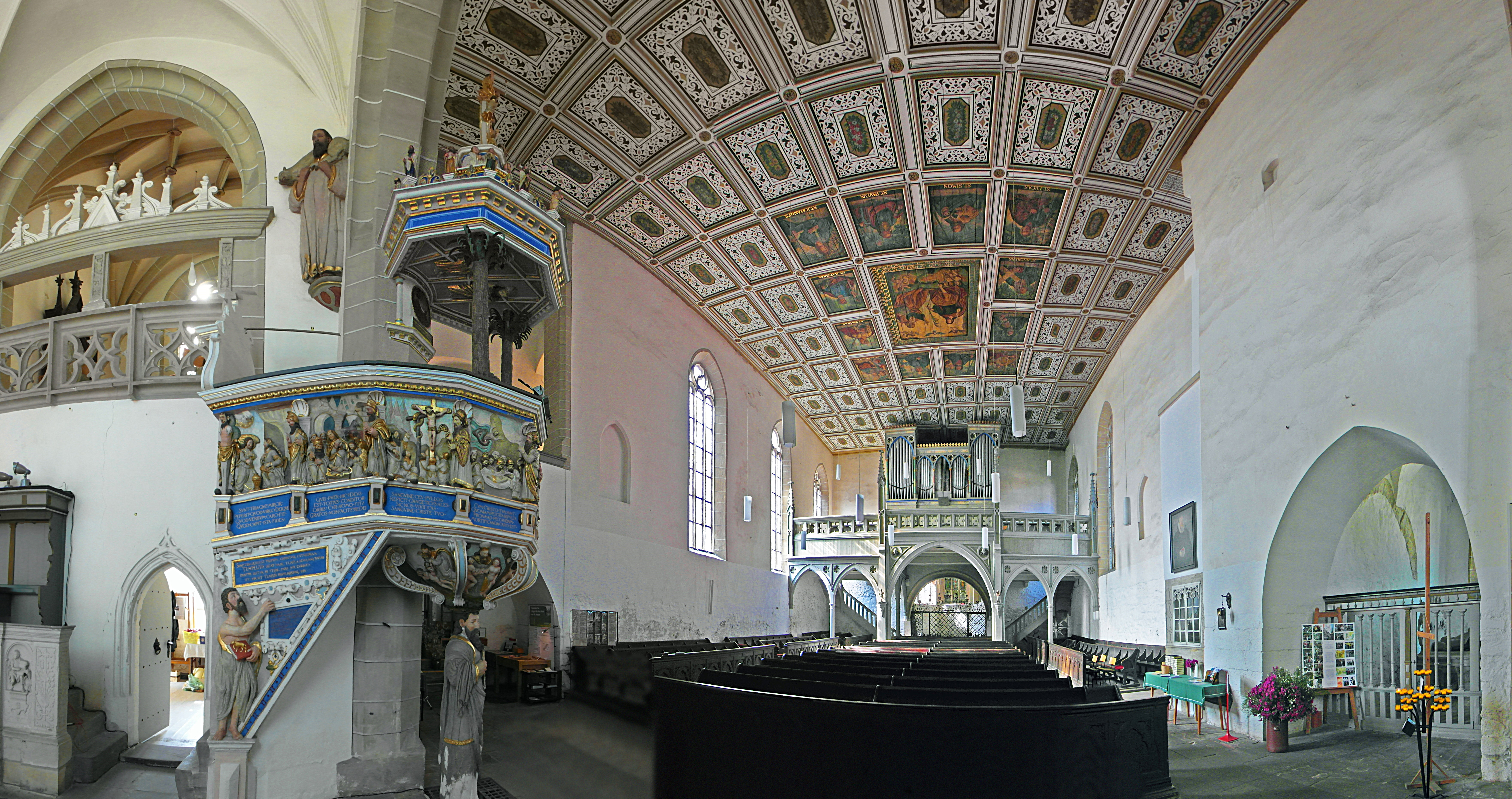 St.-Annen-Kirche von 1514